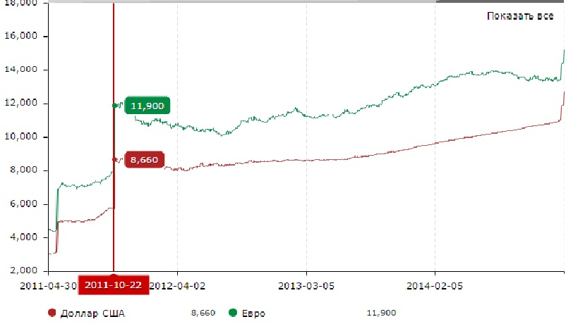 Курс белорусского рубля по отношению к доллару и евро